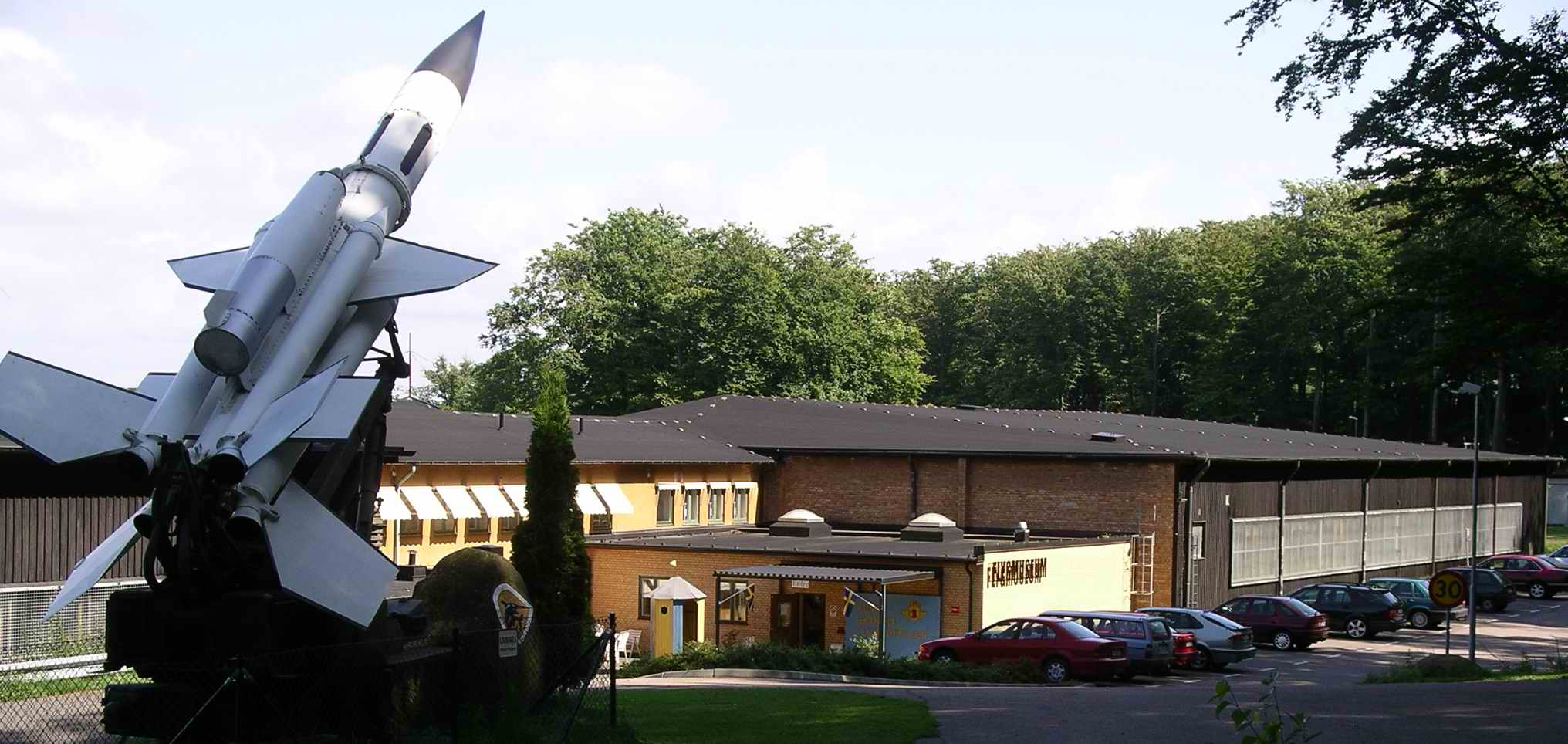 Ängelholms flygmuseum och en Bloodhound luftvärnsrobot.